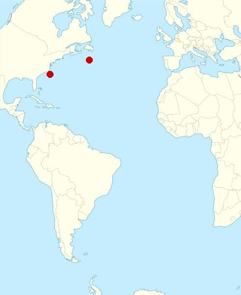 Distribución de Pliciloricus enigmaticus Higgins & Kristensen, 1986.